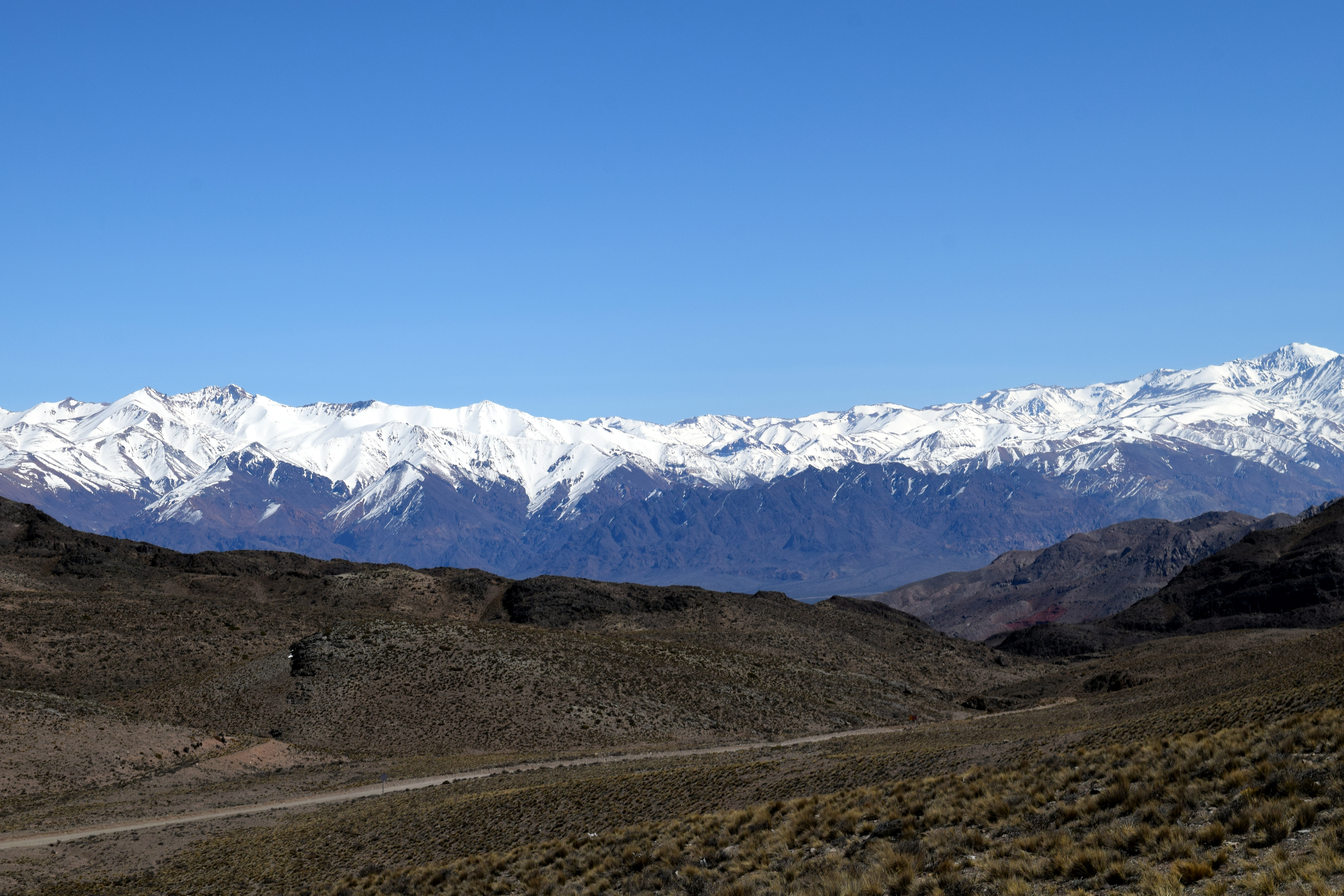 Vista del Cordón del Plata en la provincia de Mendoza.